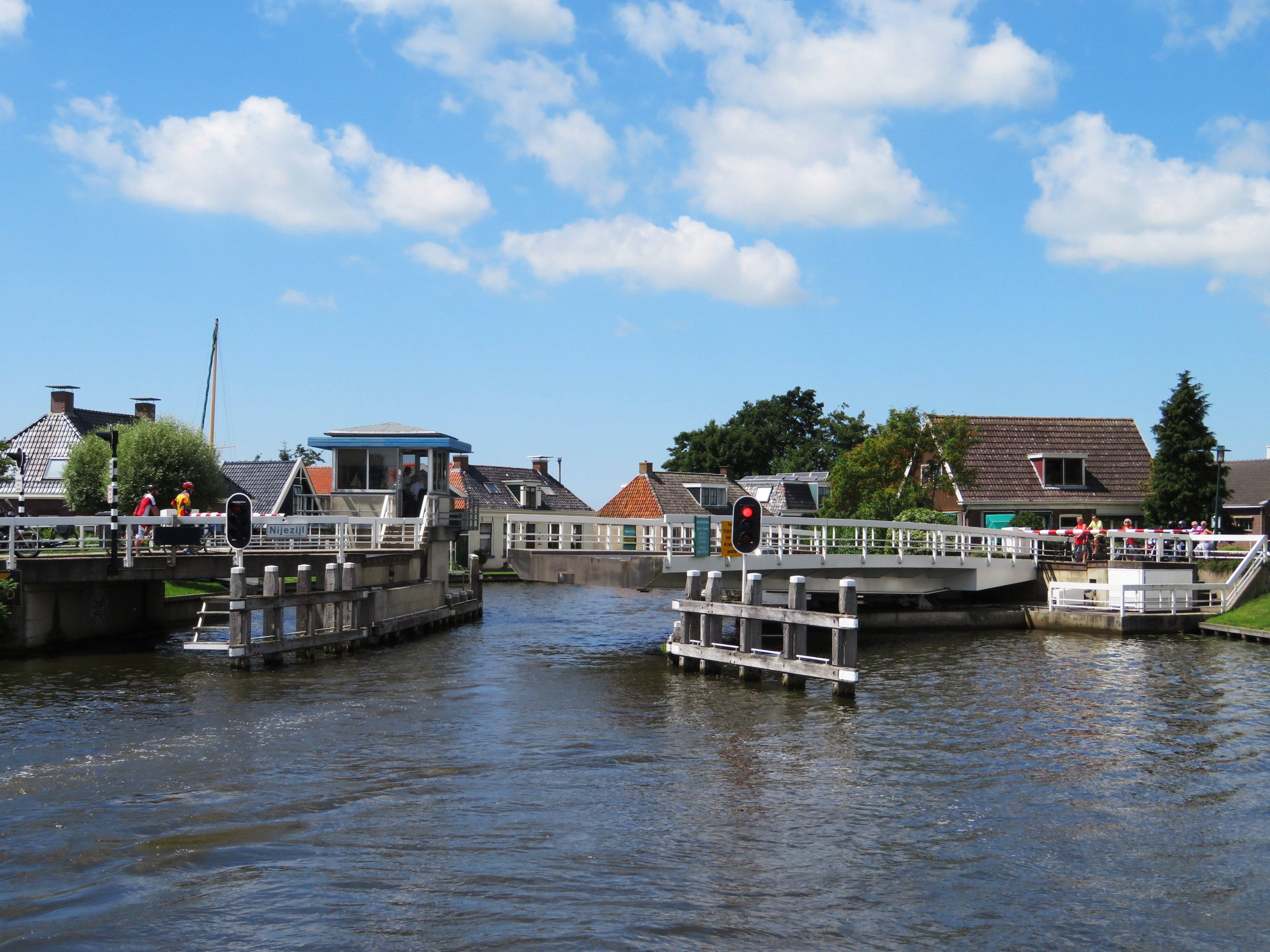 Nijezijlbrug bij Nijezijl in Friesland